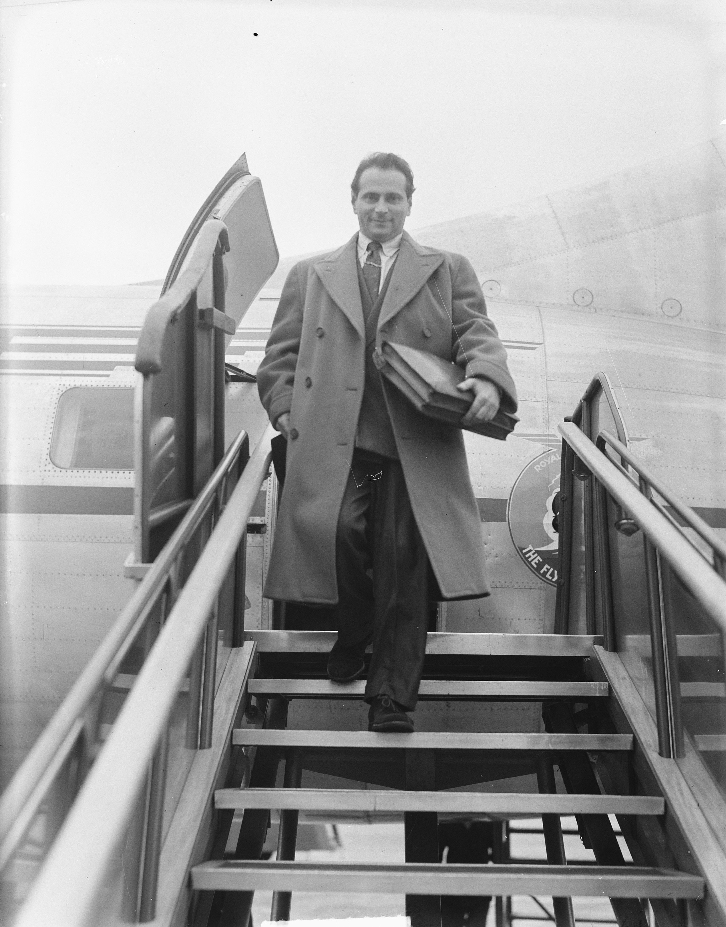 Collectie / Archief : Fotocollectie Anefo Reportage / Serie : [ onbekend ] Beschrijving : Aankomst dirigent Walter Susskind op Schiphol. Hij zal het Concertgebouworkest dirigeren Datum : 6 november 1950 Locatie : Noord-Holland, Schiphol Trefwoorden : aankomsten, dirigenten, muziek Persoonsnaam : Susskind Walter Fotograaf : Noske, J.D. / Anefo Auteursrechthebbende : Nationaal Archief Materiaalsoort : Glasnegatief Nummer archiefinventaris : bekijk toegang 2.24.01.09 Bestanddeelnummer : 904-2813